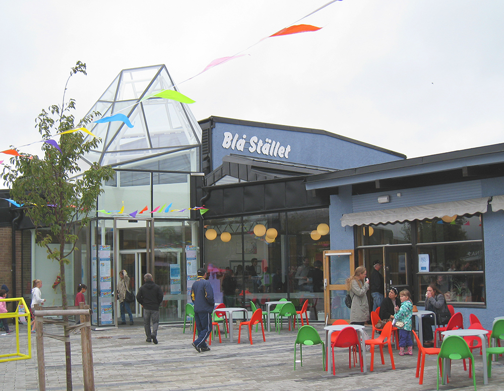 Blå stället, Angered, Göteborg vid återinvigningen 30 augusti 2014